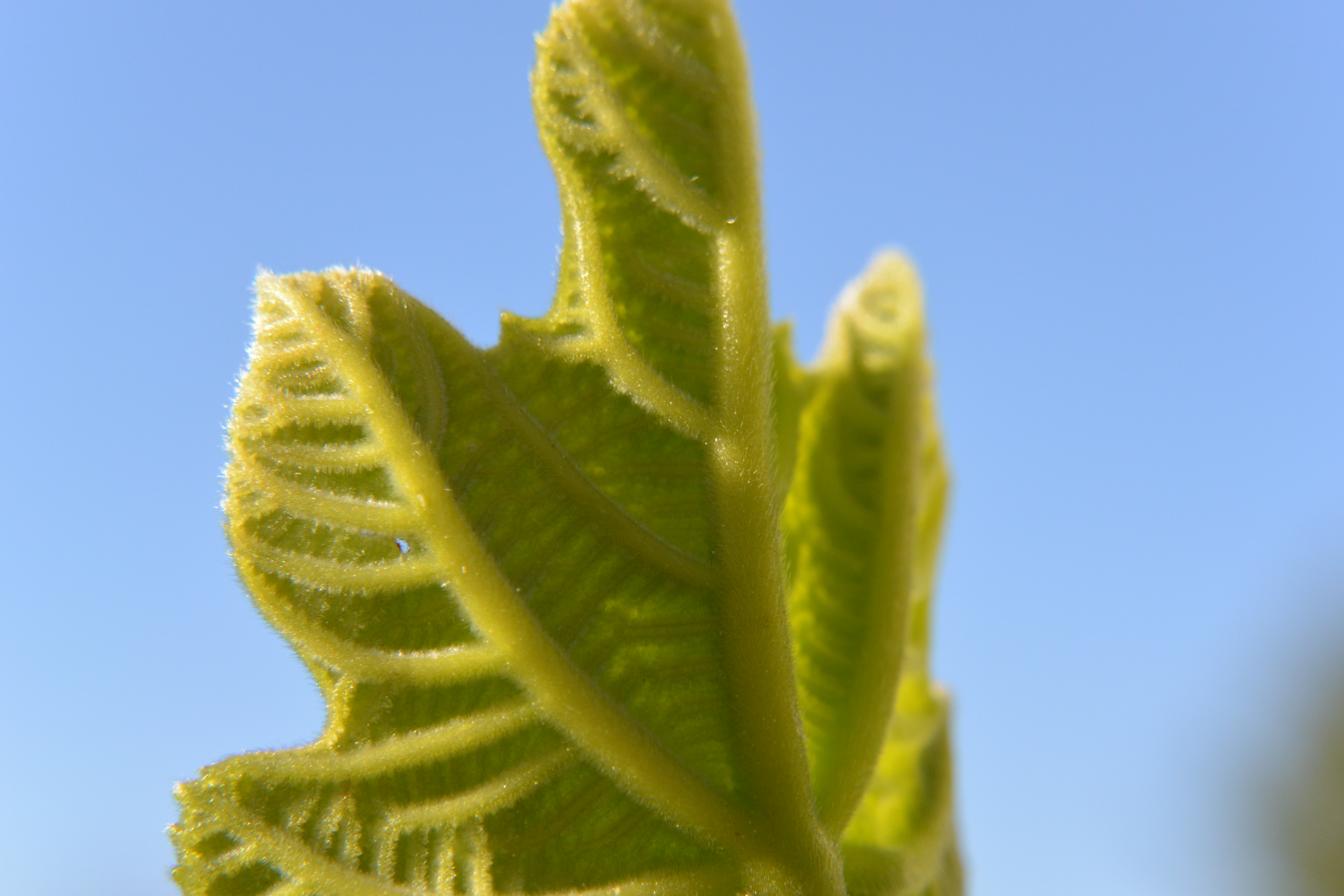 Der Frühling ist da 7. März 2014 Phoenix Arizona